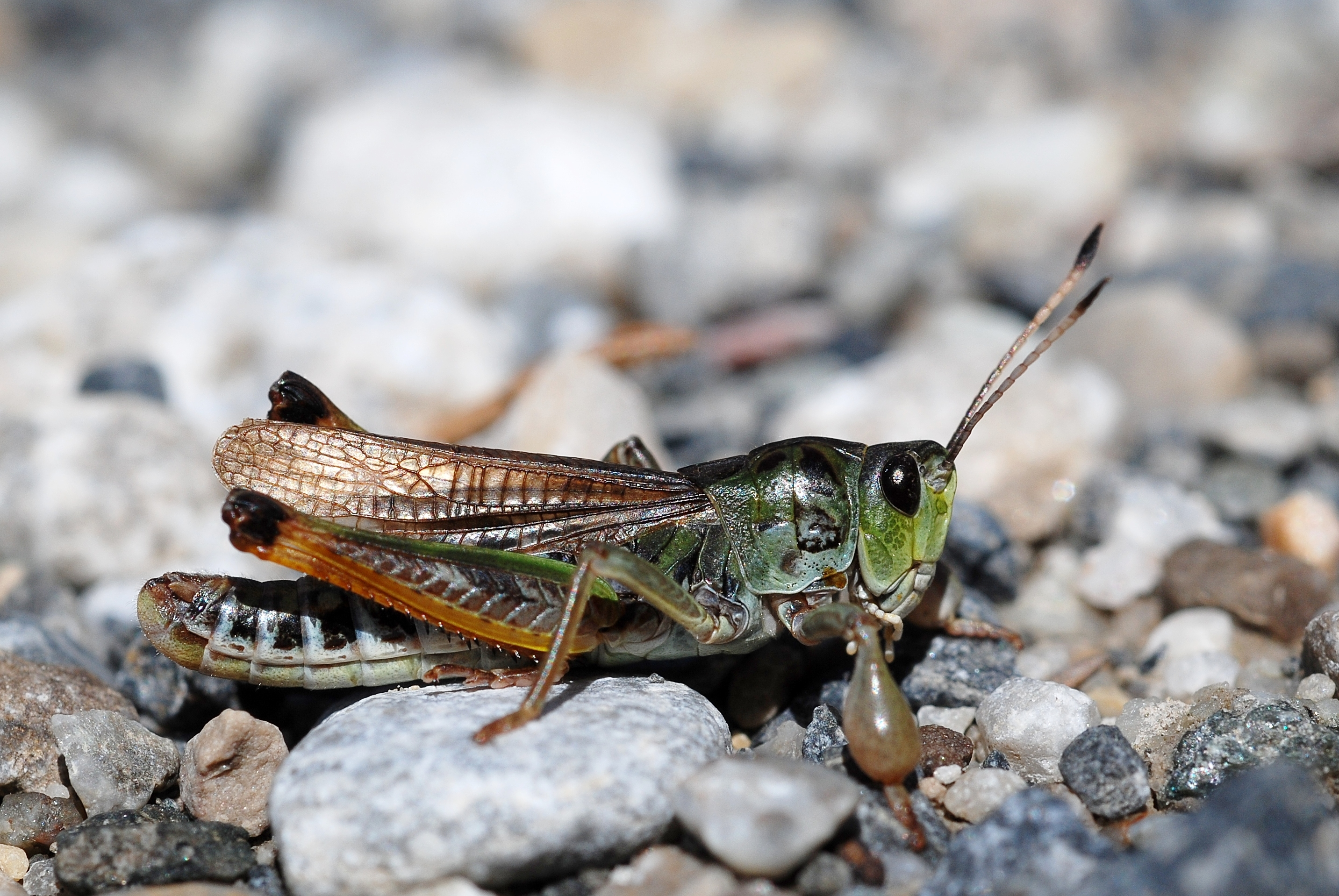 Gomphocerus sibiricus male